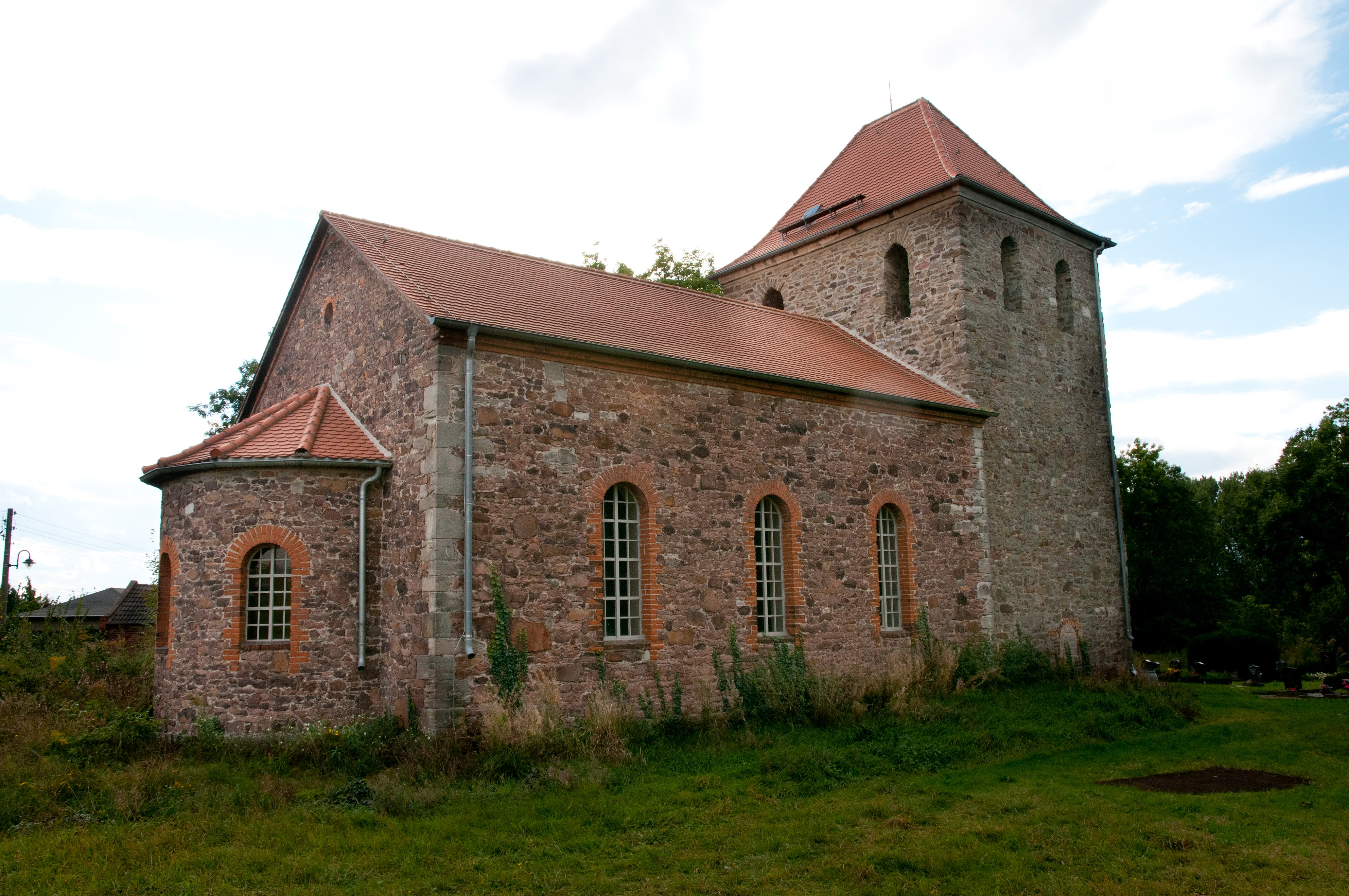 Priester Kirche (Sachsen Anhalt, Deutschland)